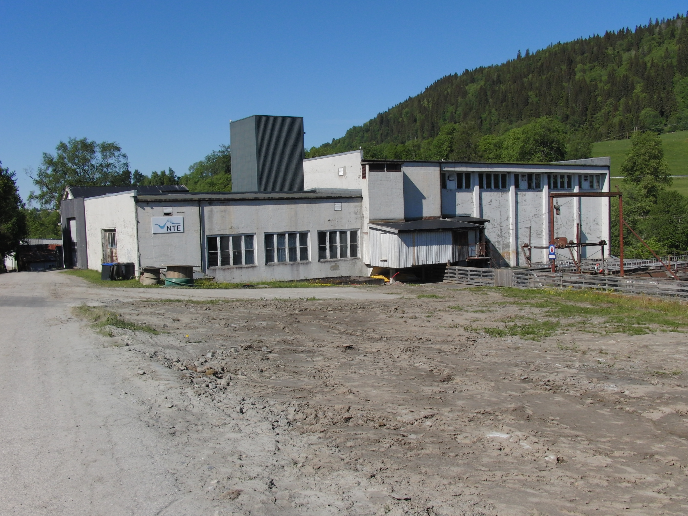 Byafossen kraftverk